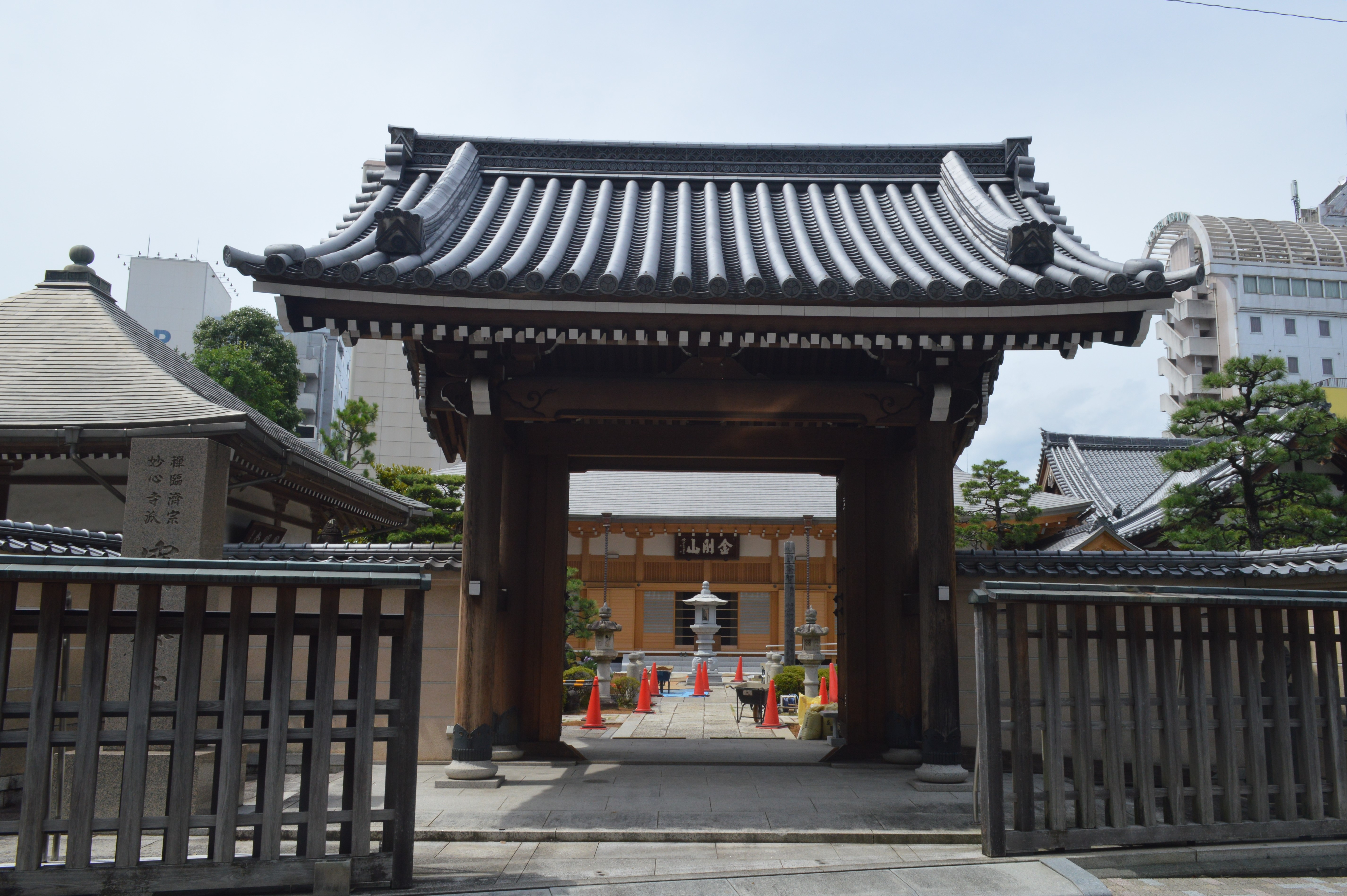 静岡県静岡市葵区にある宝泰寺。